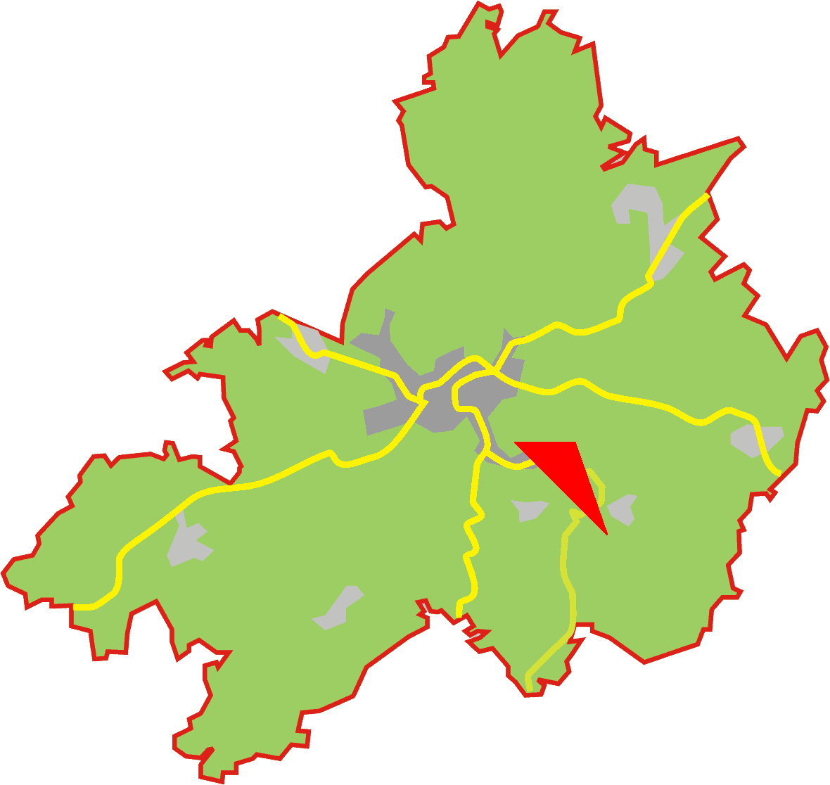 Pos hahnenberg